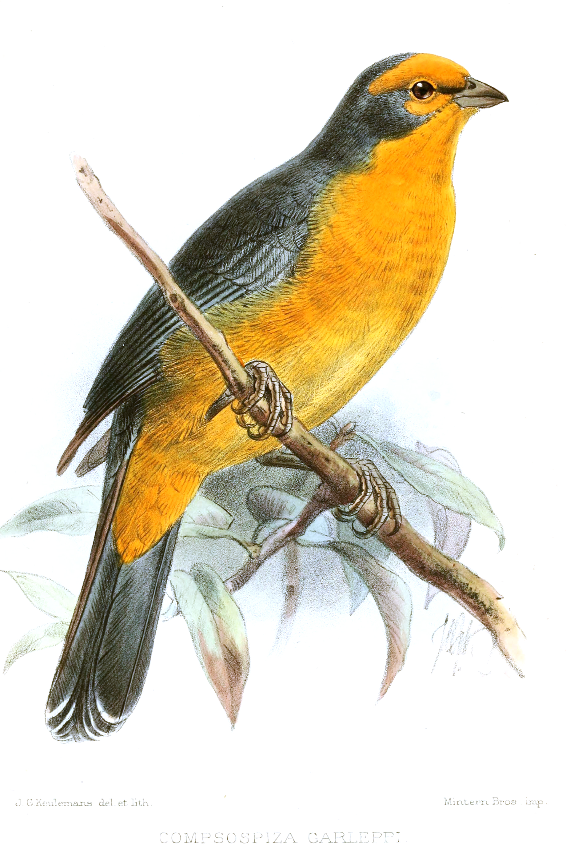 Compsospiza garleppi